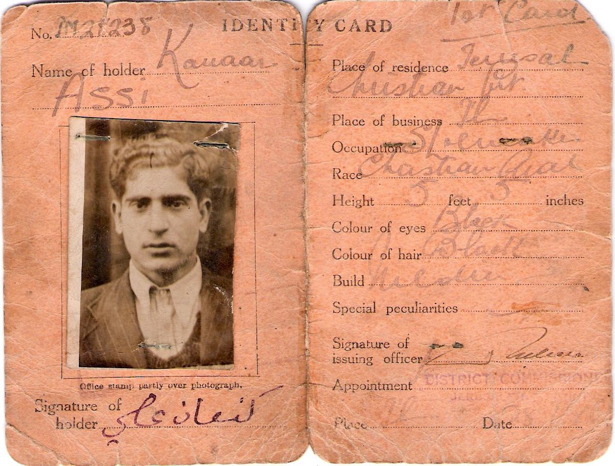 תעודת זהות מנדטורית של כנעאן עאסי, ערבי תושב ירושלים.